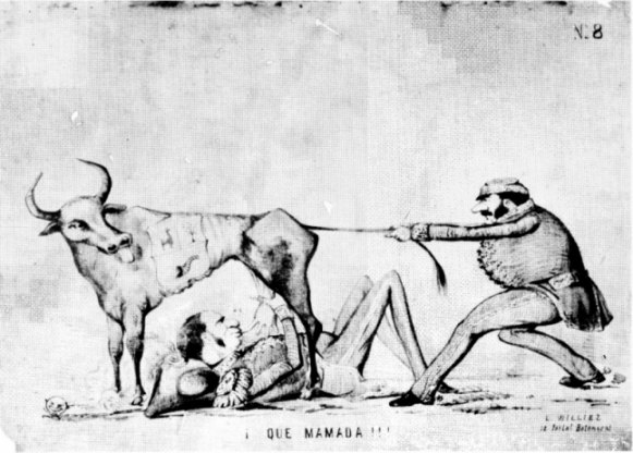 Caricatura sobre el escándalo de la consolidación.